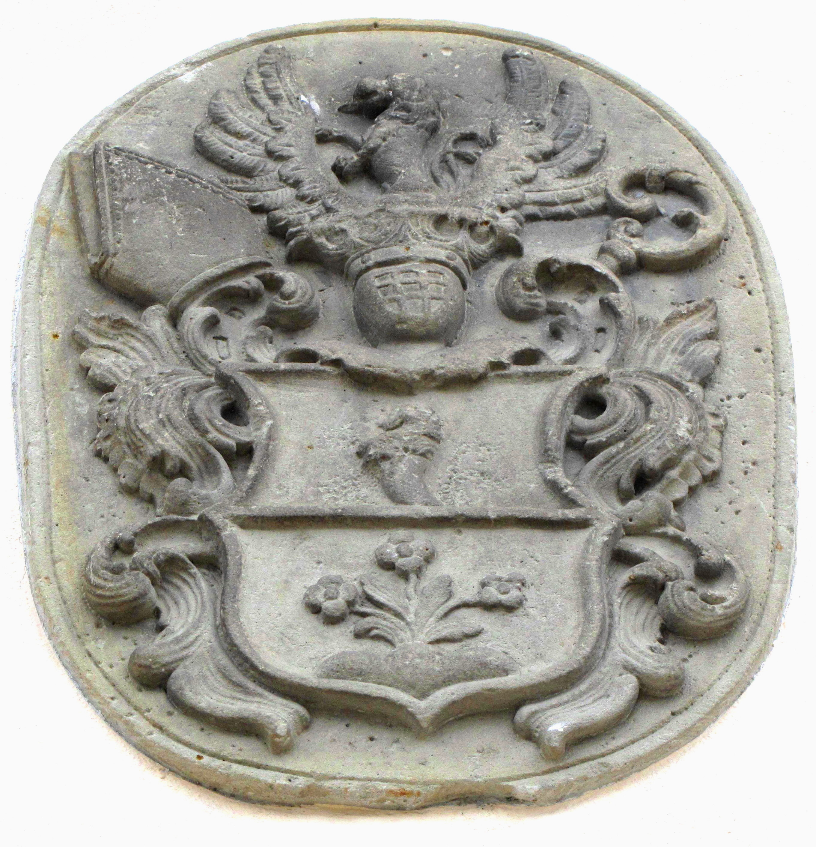 A pápoci perjelség címere (Vas megye, Magyarország)